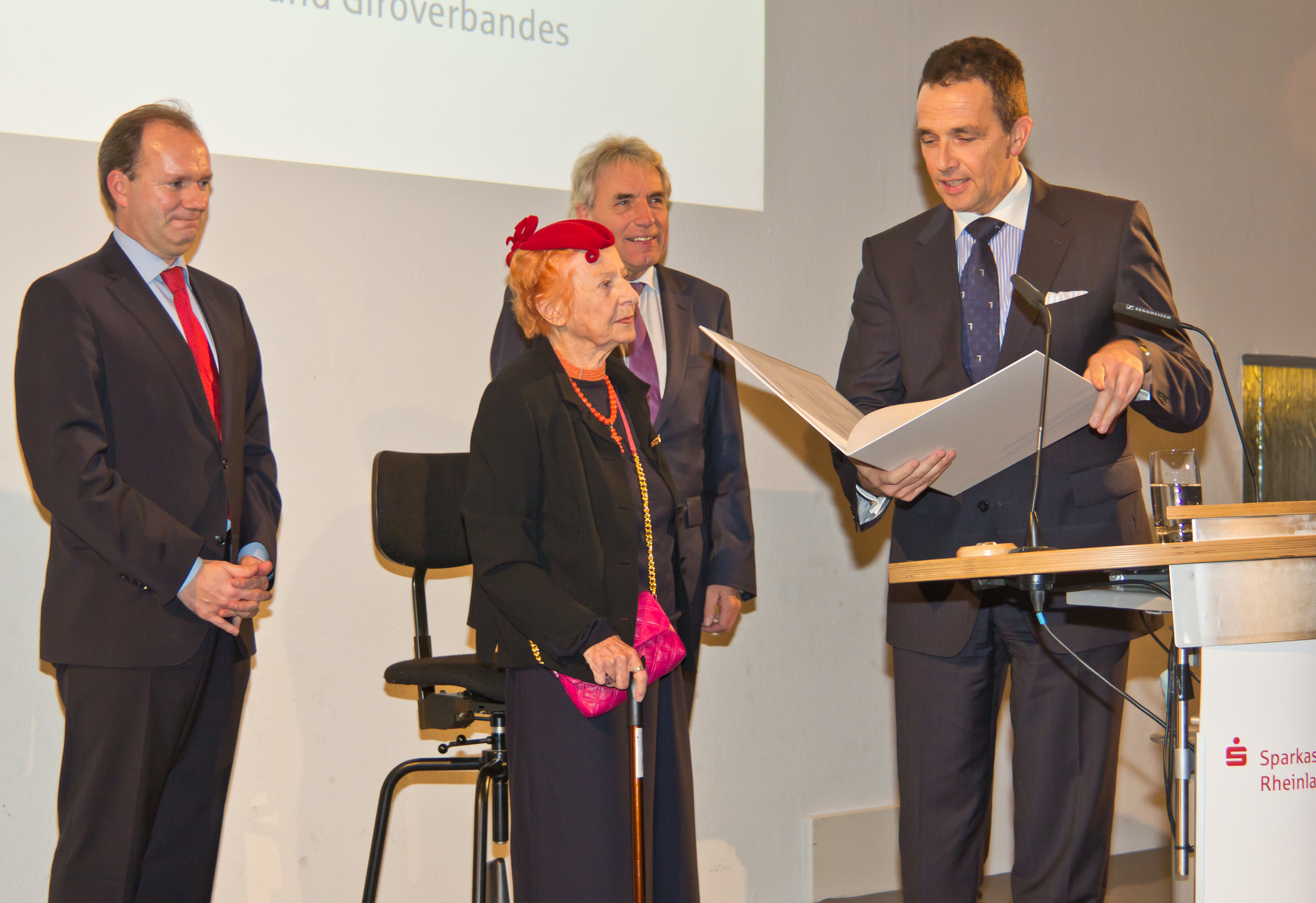 Verleihung des Rheinischen Kulturpreises der Sparkassen-Kulturstiftung Rheinland in der Piazetta des historischen Rathauses von Köln an Alexandra Kassen. Übergabe des Preise. Depicted people: Michael Breuer (Präsident des Rheinischen Sparkassen- und Giro-verbandes und Vorsitzender des Stiftungs-Kuratoriums), Alexandra Kassen (Preisträgerin), Jürgen Roters (Oberbürgermeister von Köln) and Dr. Christoph Landscheidt (Bürgermeister der Stadt Kamp-Lintfort und Vorsitzender des Vorstandes der Sparkassen-Kulturstiftung Rheinland)